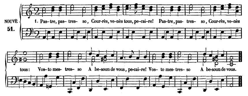 Partition de Pastres e pastresso